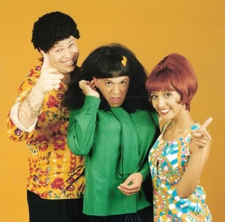 תמונות של דומינו גרוס